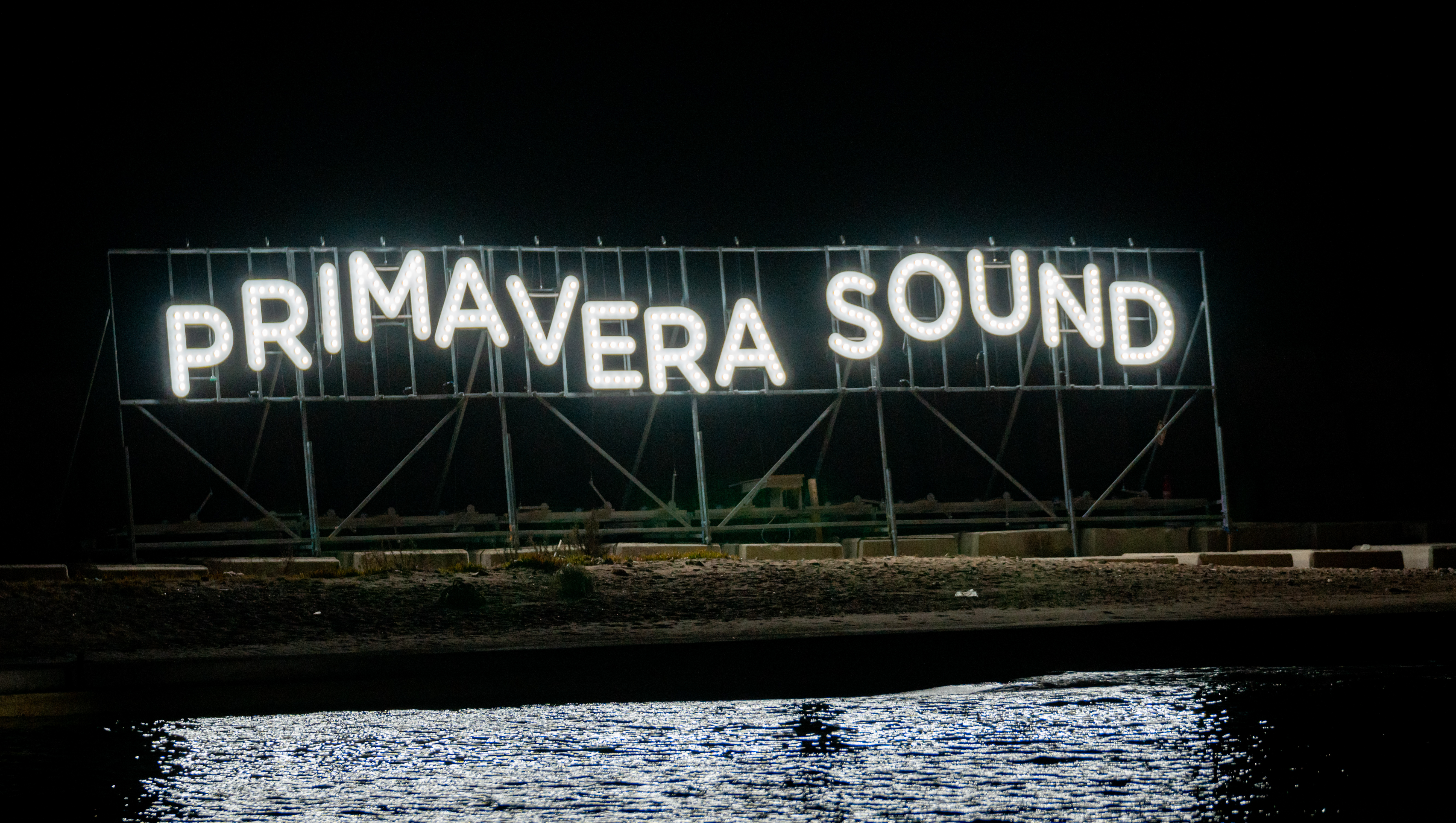 Primavera19_-93